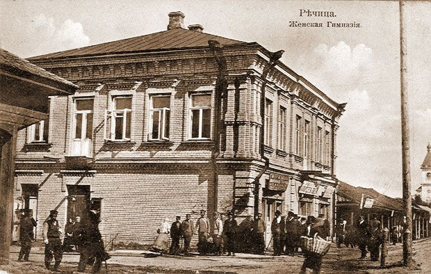 Беларуская (тарашкевіца): Рэчыца (Rečyca), рог вуліцы Кашарскай (vulica Kašarskaja) і завулка Школьнага (zavułak Školny). Жаночая гімназія